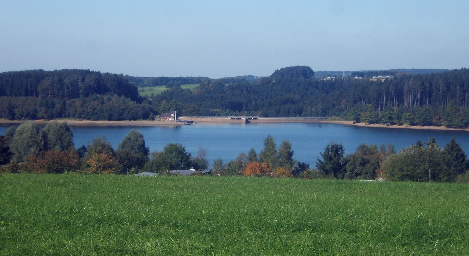 Brucher Talsperre in Marienheide-Rodt, gesehen von der Müllenbacher Straße.